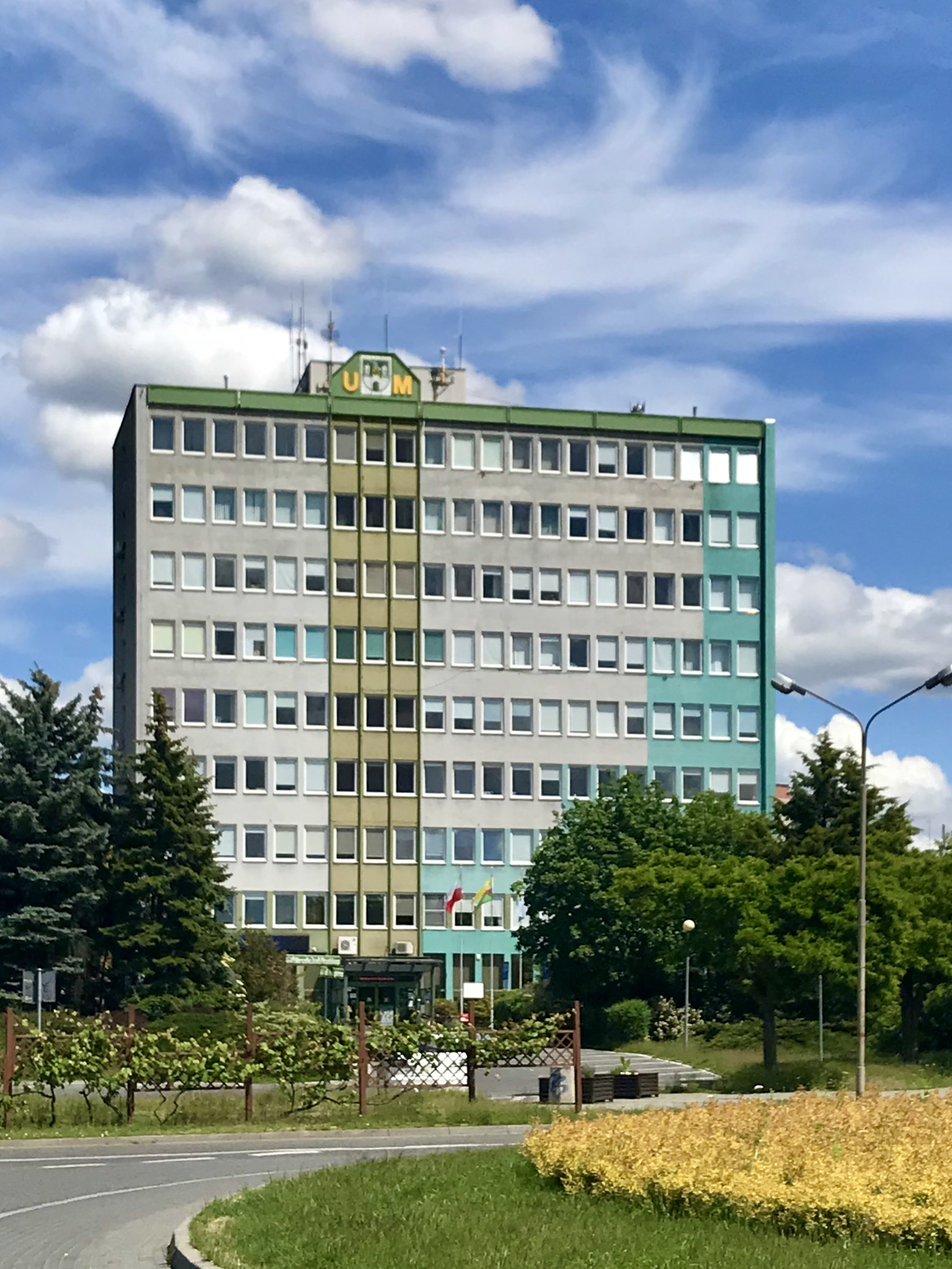 Urząd Miasta Zielona Góra